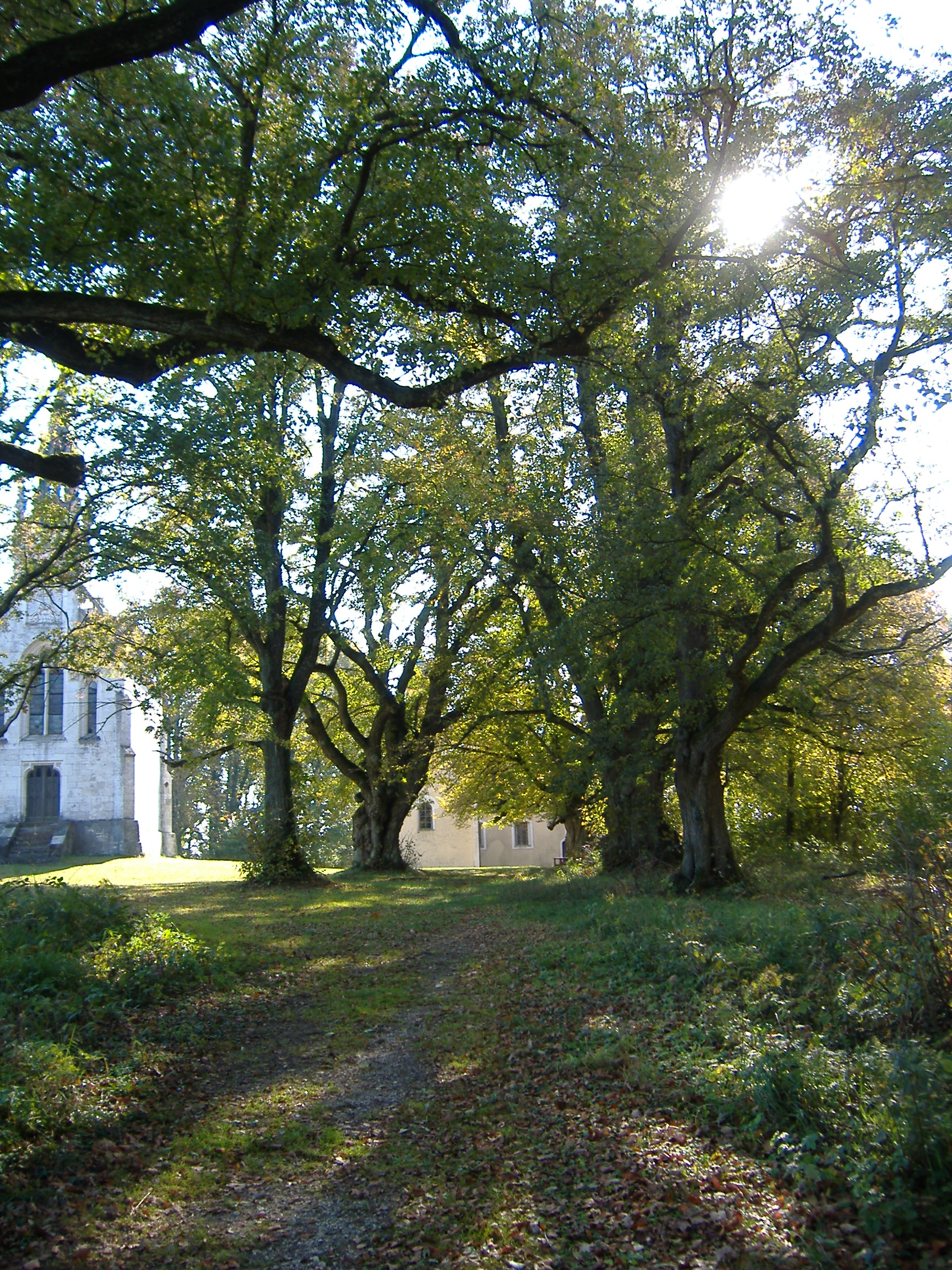 Stepperg